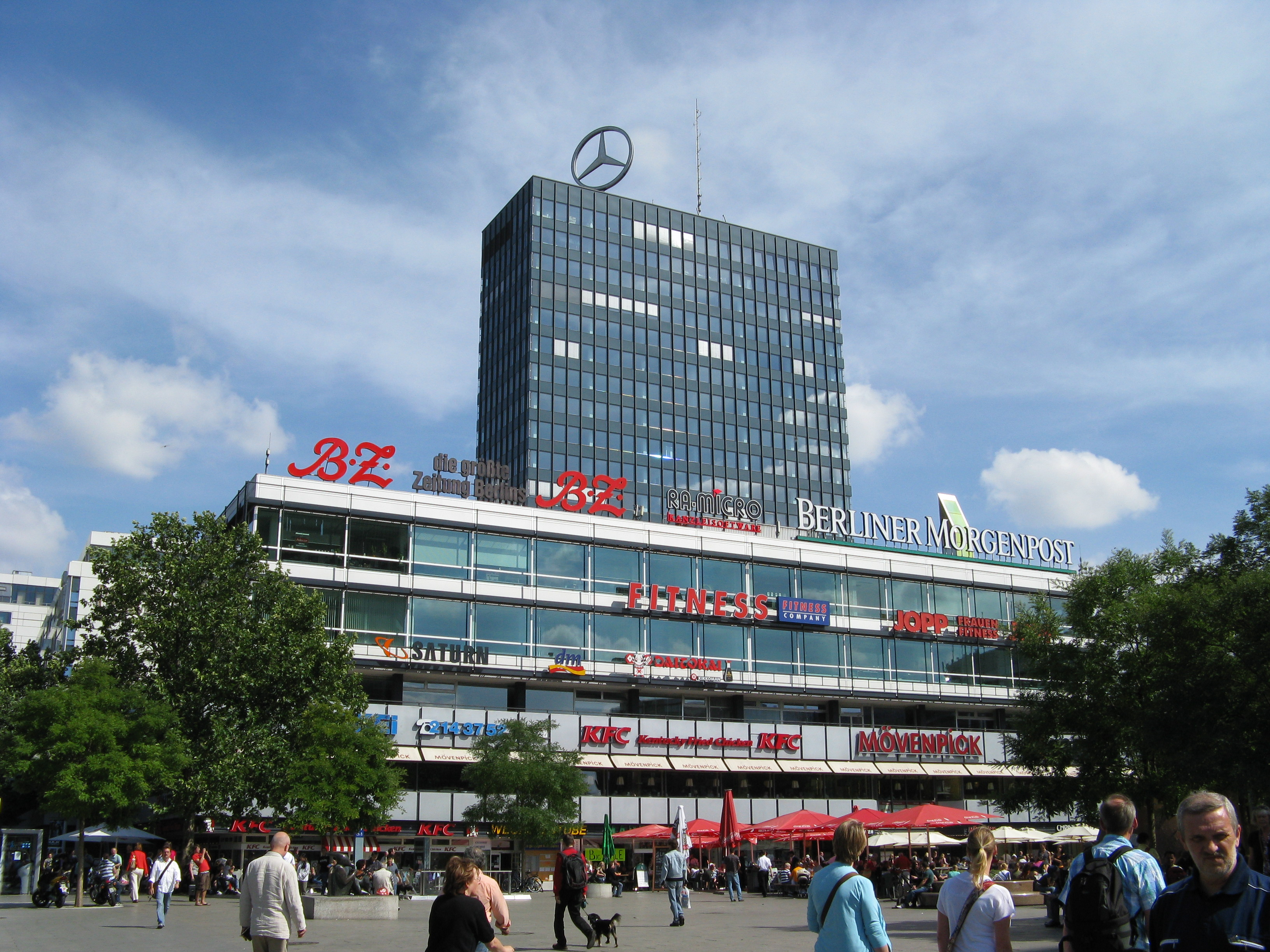 Europa Centre